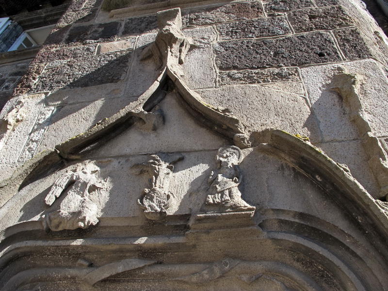 Porte de l'hotel des Princes de Monaco